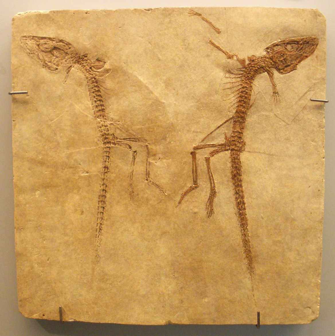 Fossil of Alligatorellus, an extinct crocodile Took the photo at Musee d'Histoire Naturelle, Brussels